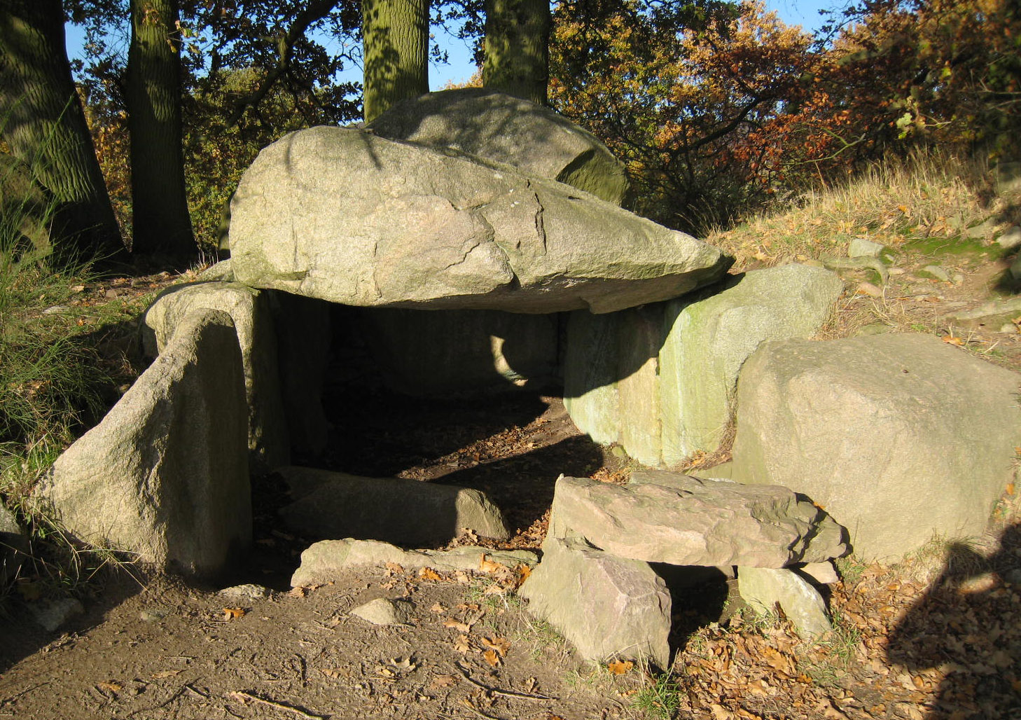 Großsteingrab Lancken 1 (nach Sprockhoff: Nr. 504[1]). Gut erhaltenes Großsteingrab bei Lancken-Granitz auf der Insel Rügen Object location54° 21′ 46.08″ N, 13° 37′ 09.74″ E